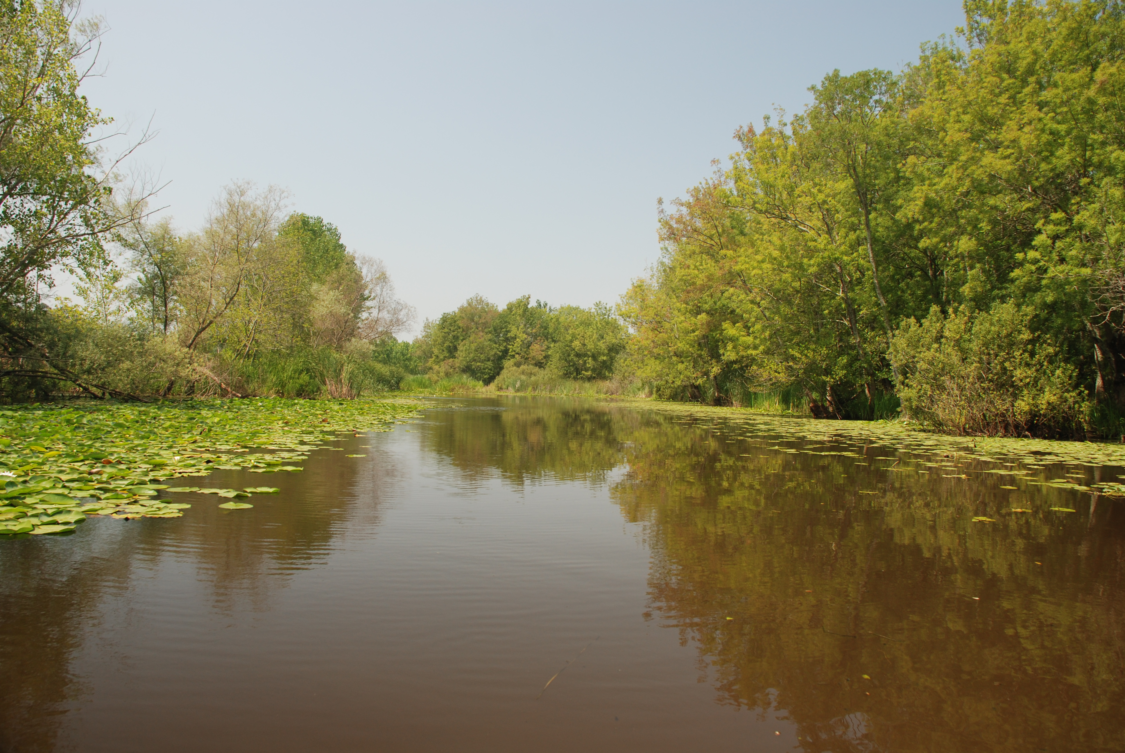 Acarlar Longoz Ormanı.